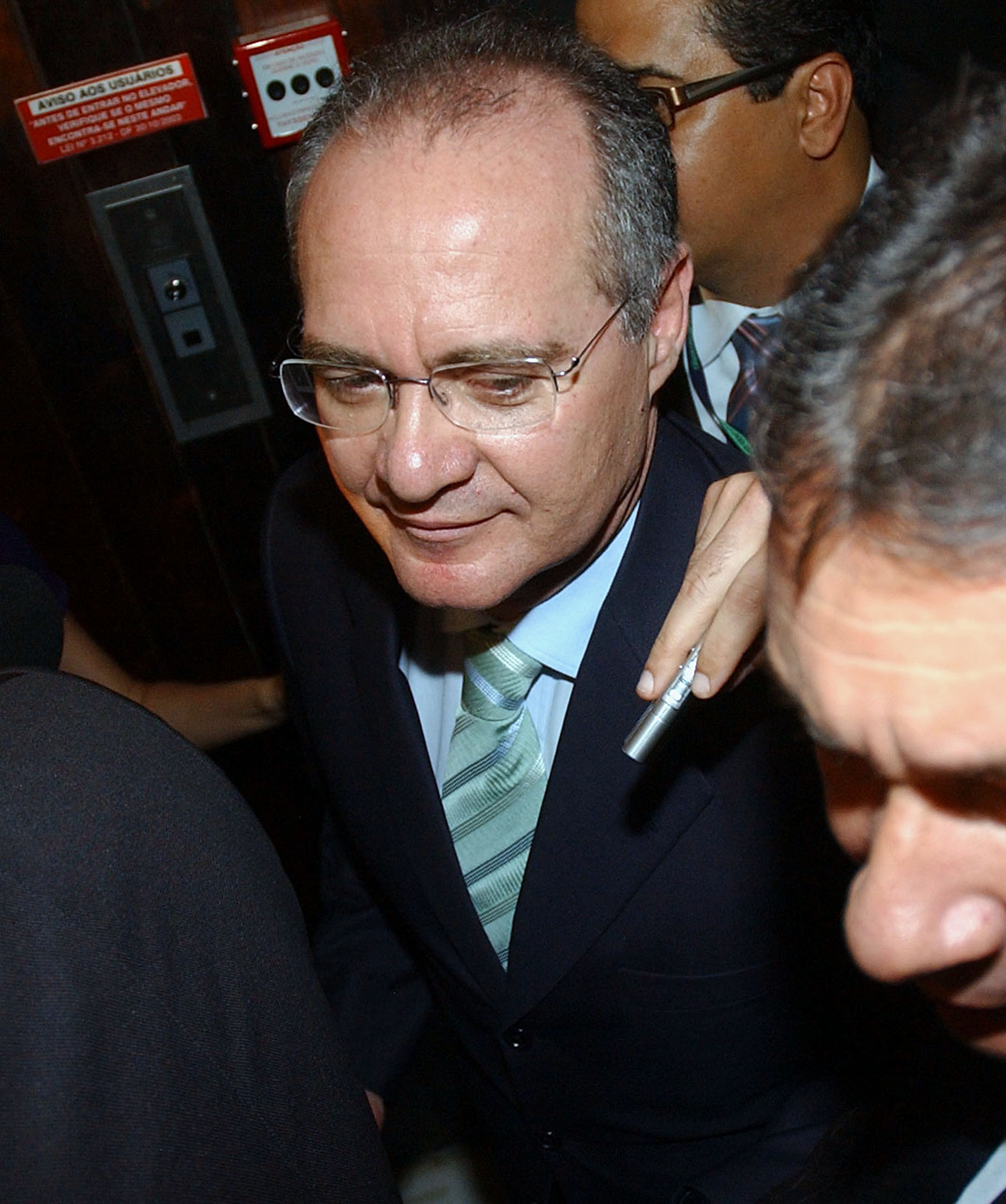 Brasília - O presidente do Senado, Renan Calheiros (PMDB-AL), deixa a Casa sem falar aos jornalistas após a votação em que o plenário o absolveu em processo por quebra de decoro parlamentar